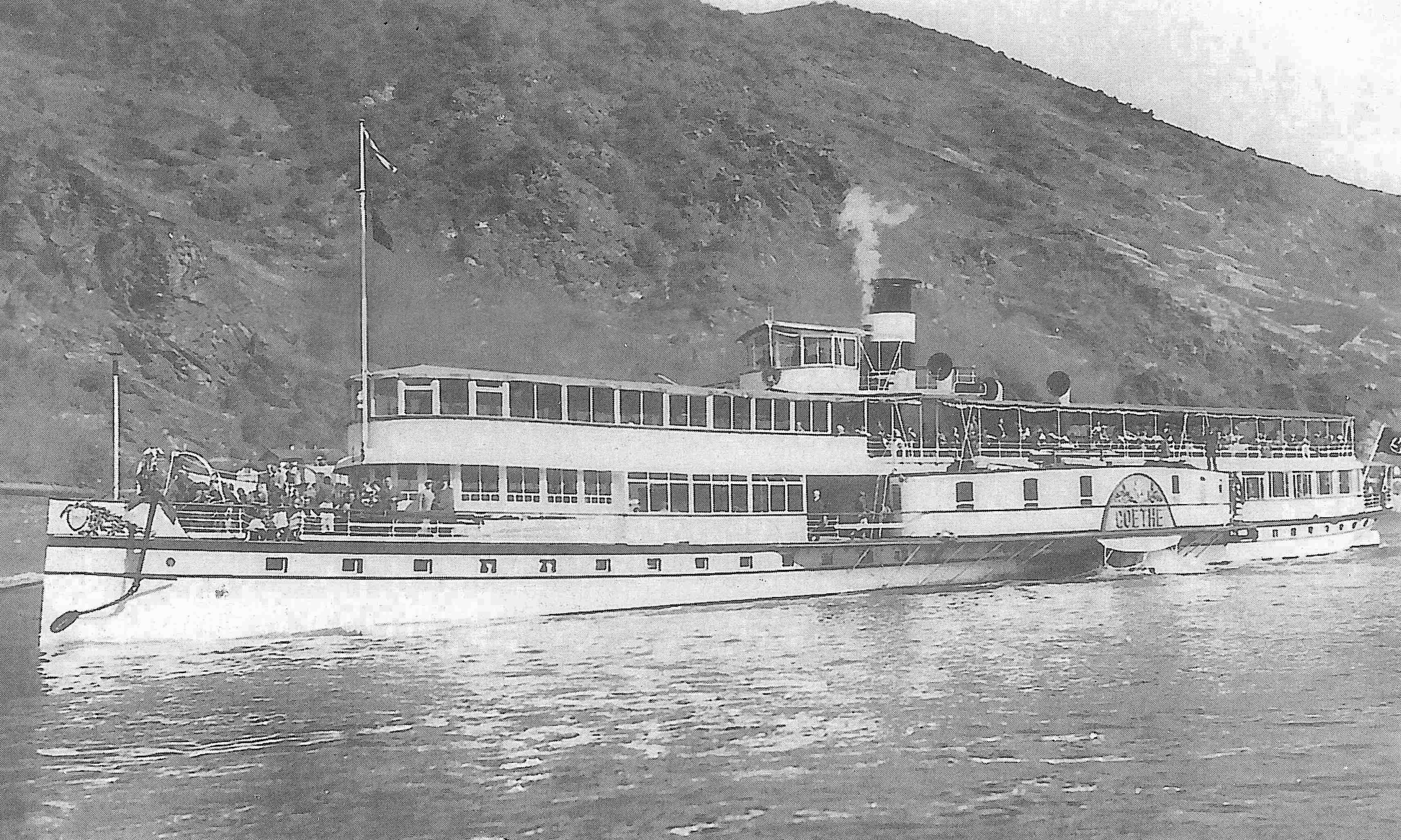 Der Raddampfer Goethe auf dem Mittelrhein